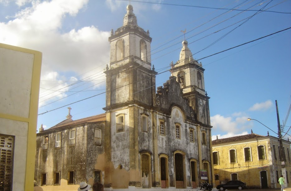 Igreja de São Cristóvão, Sergipe, Brasil.